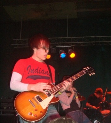 Imagen de Josh Farro en el Winter Go West Tour, en enero de 2006.